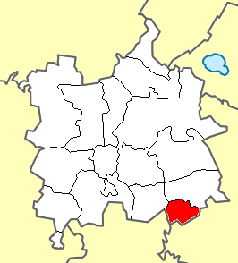 Слакбашівська сільська рада